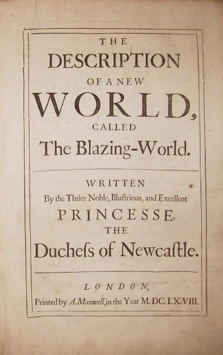 The Description of a New World, Called The Blazing-World.